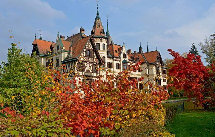 podzimní zámek Lešná